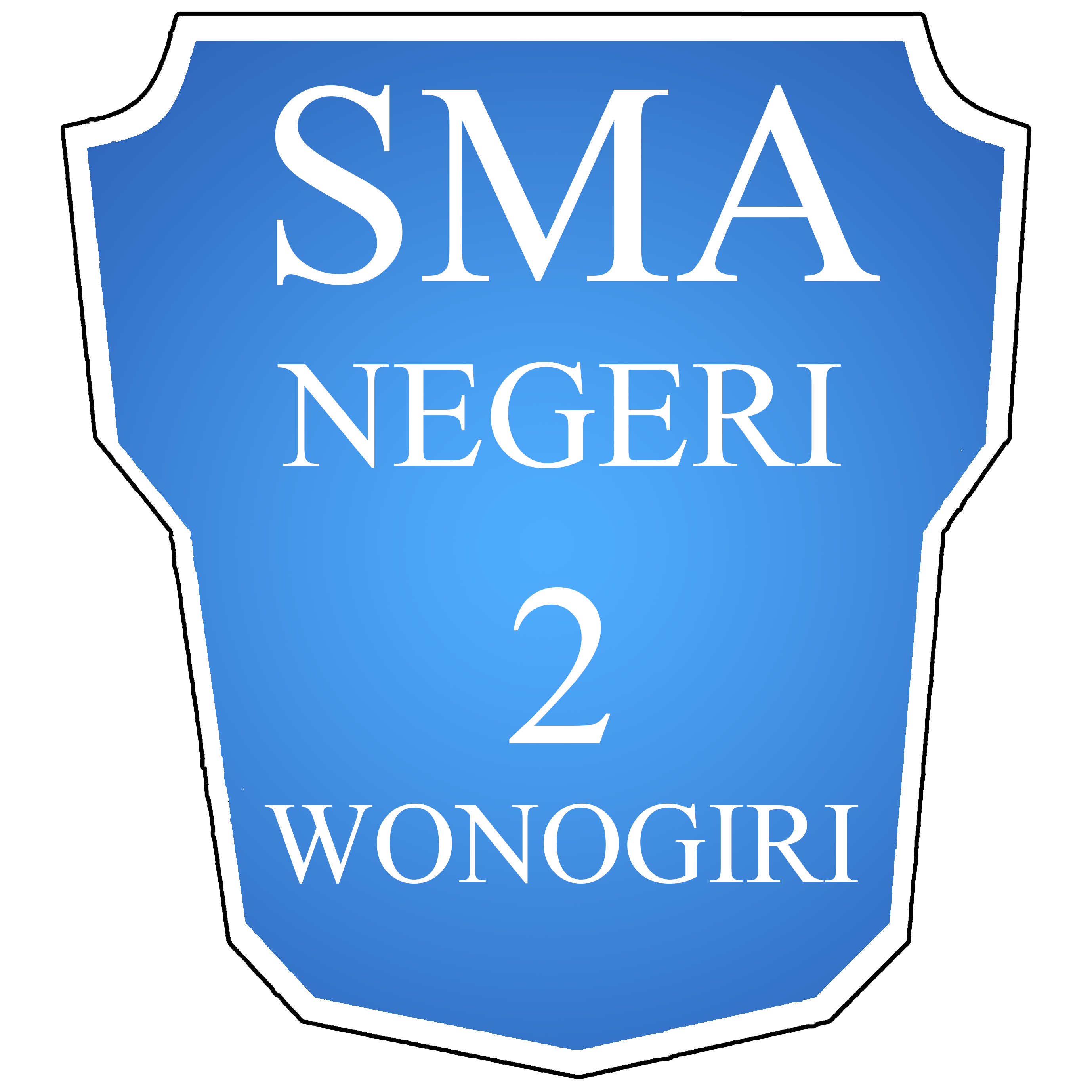 Logo SMA Negeri 2 Wonogiri (Titan Samudra)